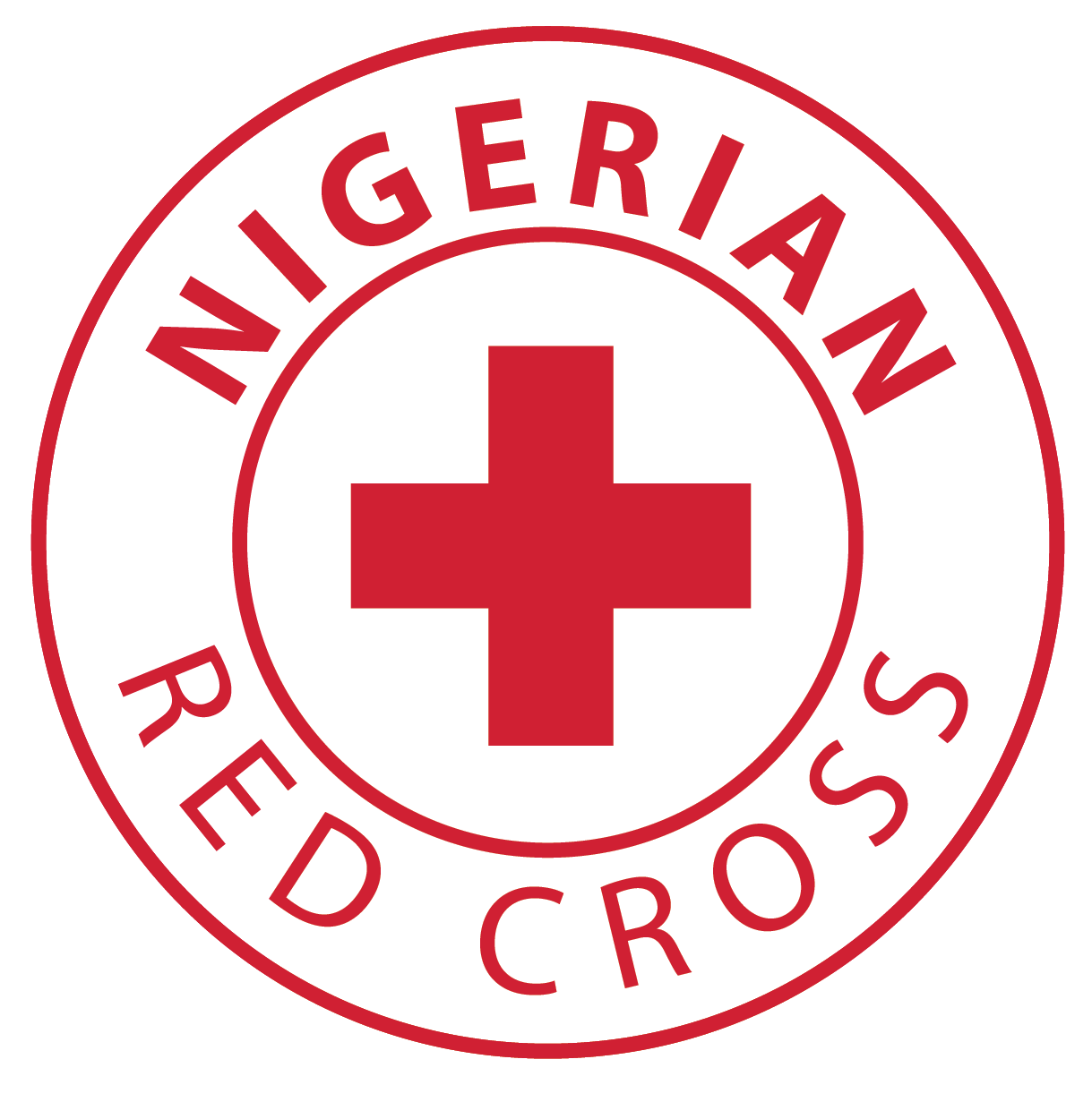 emblemo de la Niĝeria Ruĝa Kruco